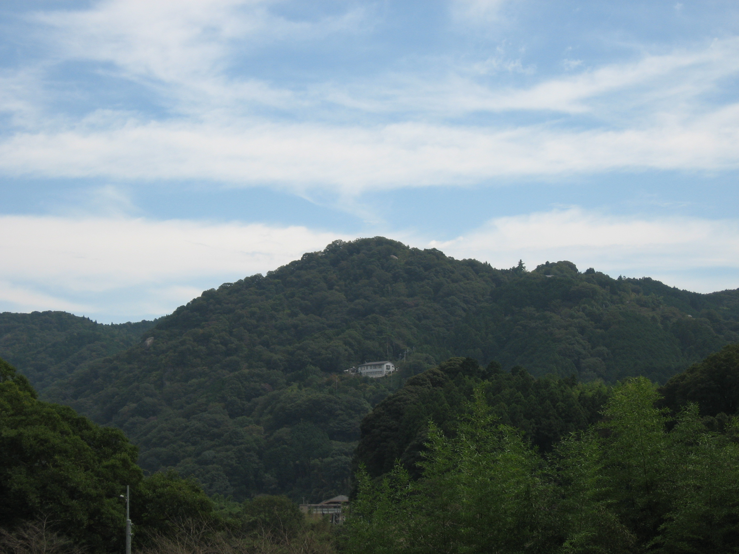 笠置山（京都府相楽郡笠置町）2012年10月